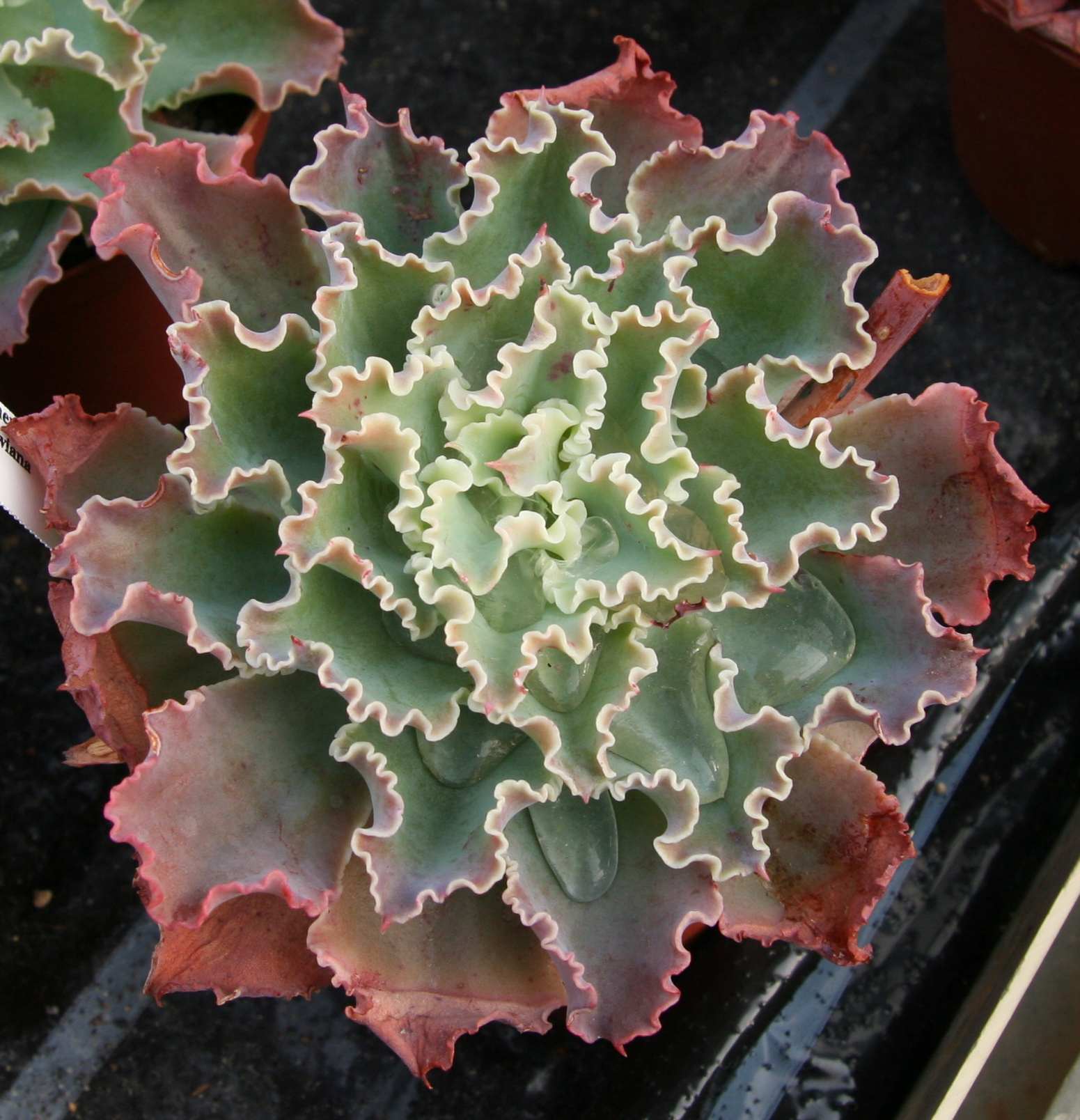 Echeveria shaviana in Kultur bei Kakteen-Haage in Erfurt